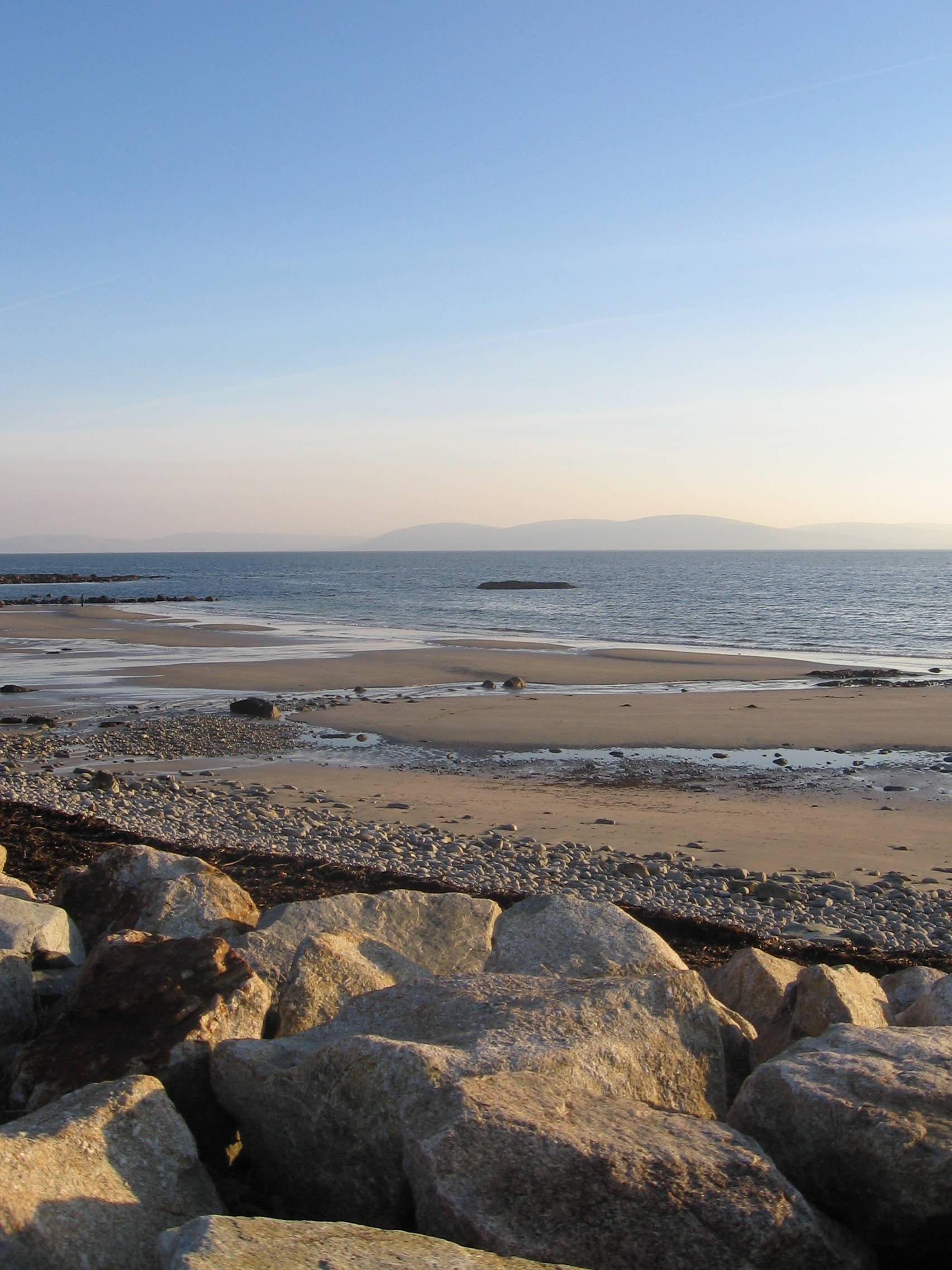 Strand von Spiddal